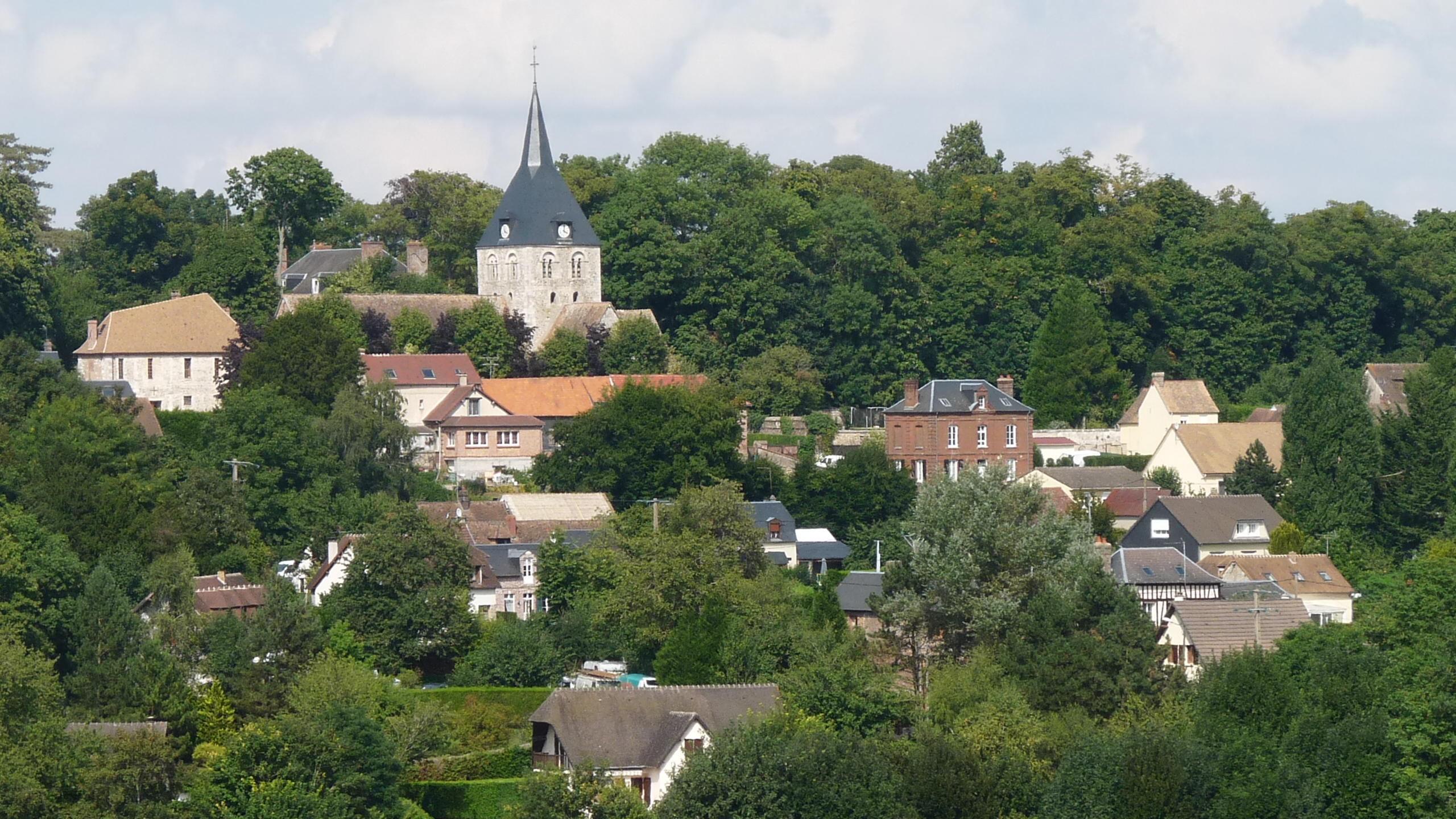 Vue générale sur Montaure depuis Ecrosville, juillet 2013. Sur les hauteurs, Notre-Dame de Montaure et le prieuré de bénédictins.